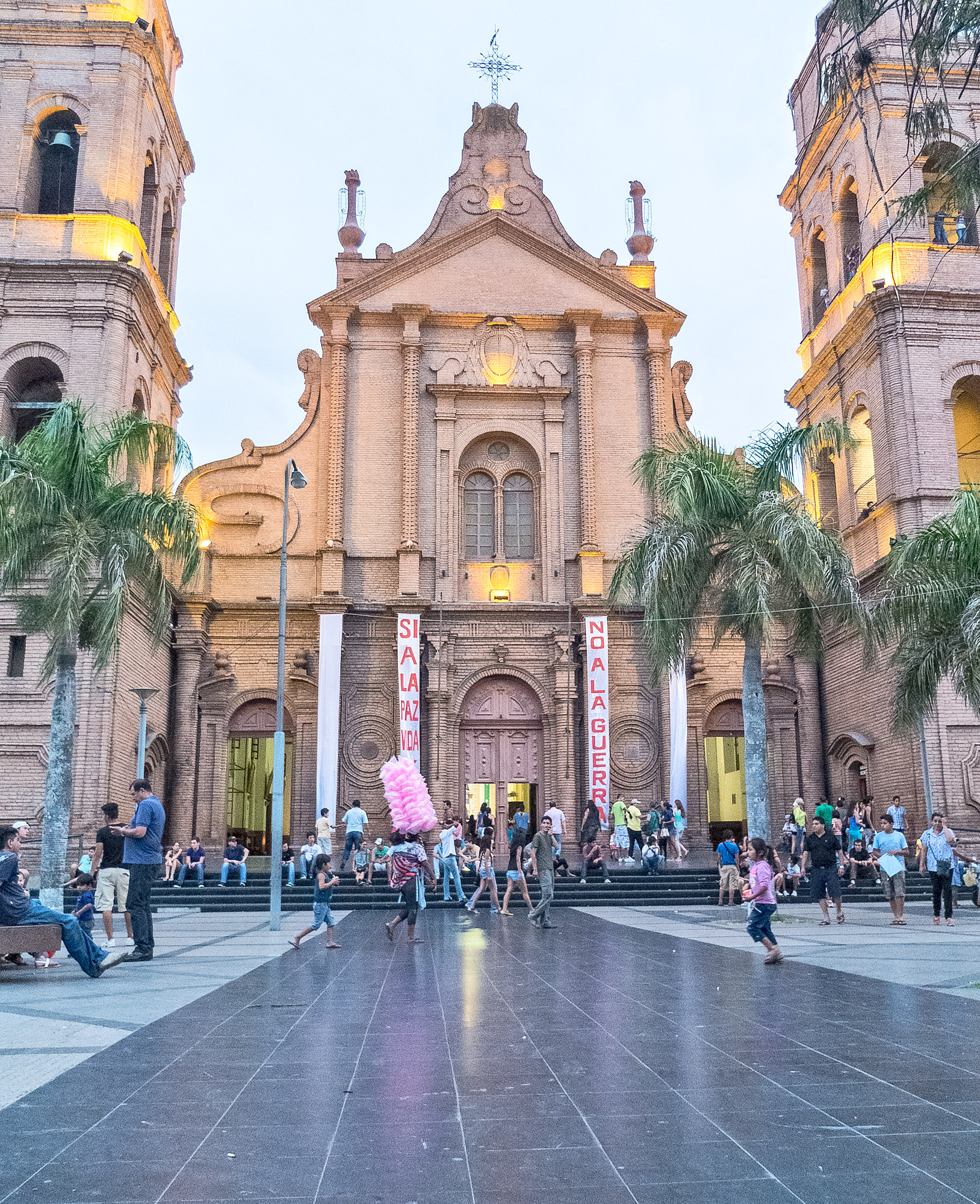 Catedral de Santa Cruz de la Sierra, Bolivia. This medium shows the protected monument with the number S/00-040 in Bolivia.